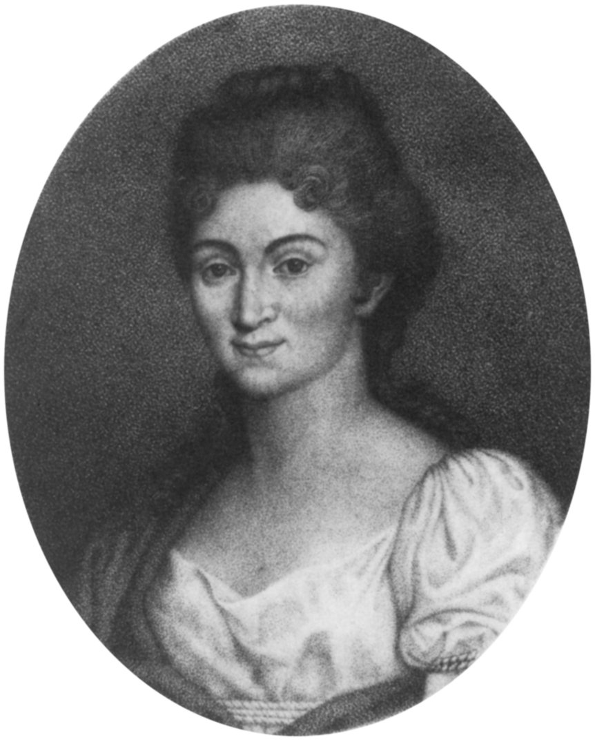 Ritratto di Lesbia Cidonia (Paolina Secco Suardo Grismondi)